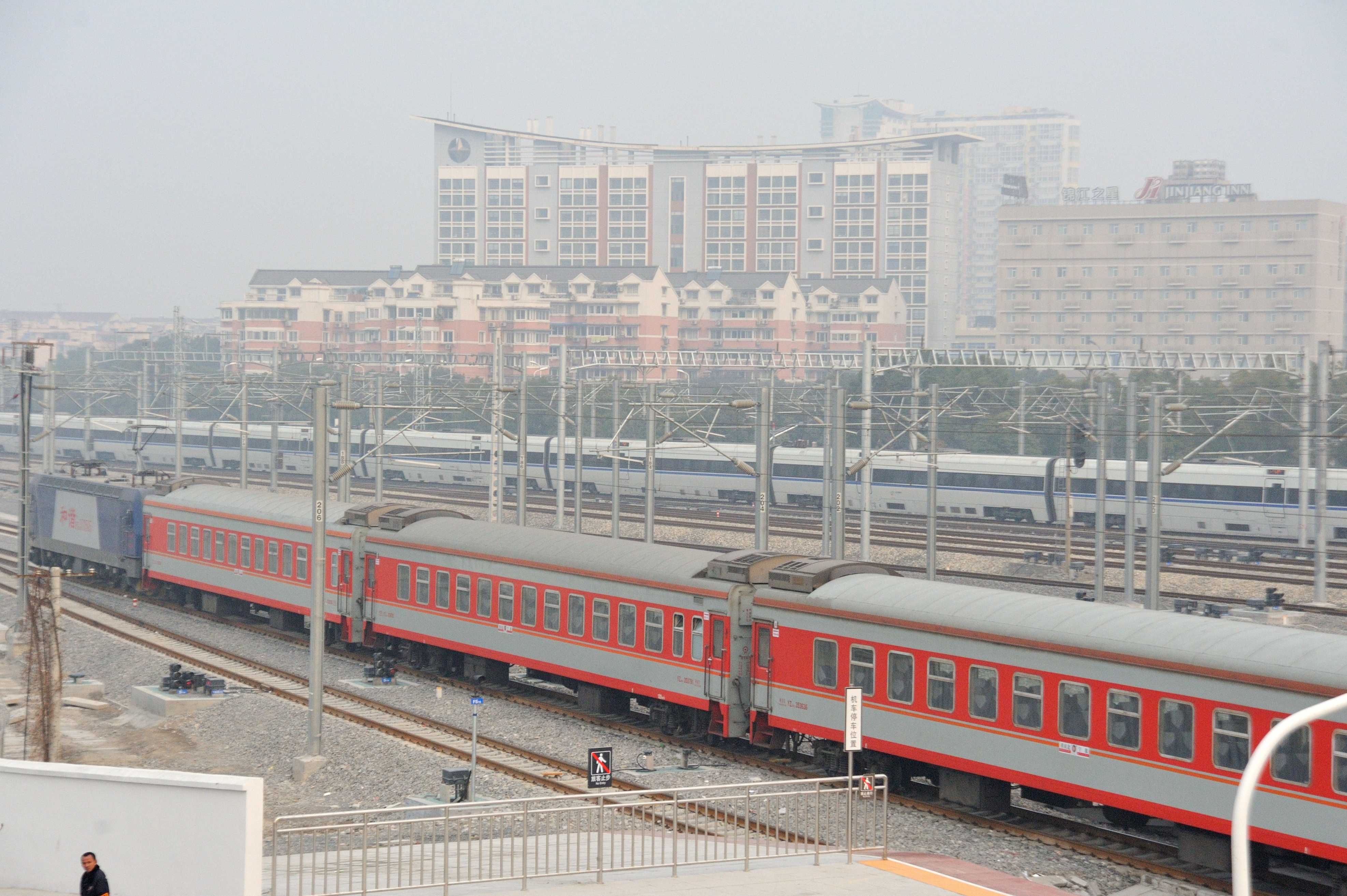 宁波站西咽喉